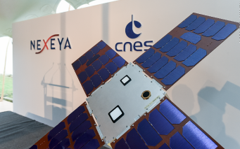 cette photo représente un des nanosatellites de NEXEYA, lors du lancement du projet ANGELS avec le CNES